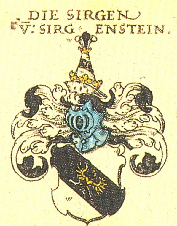 Ritterschaft und Adel in Schwaben Die Sirgen von Sirgenstein